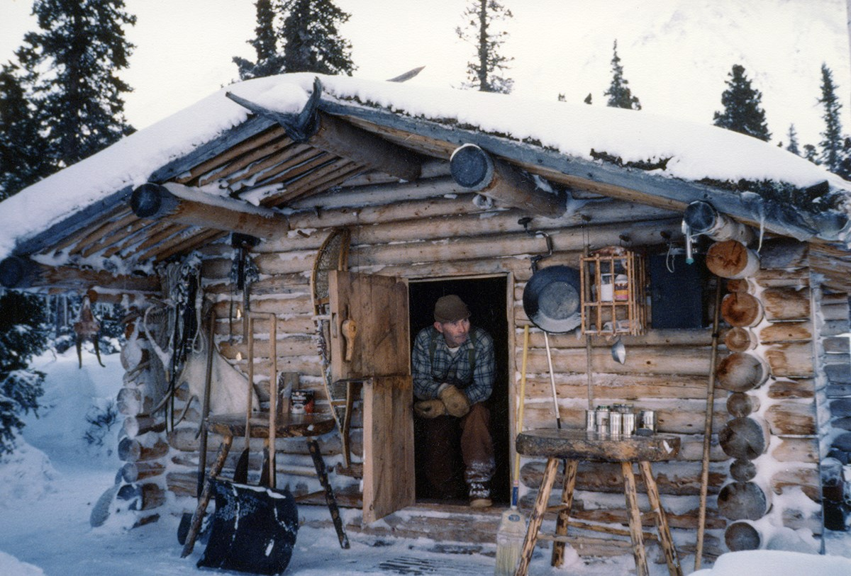 Richard Proenneke in his cabin